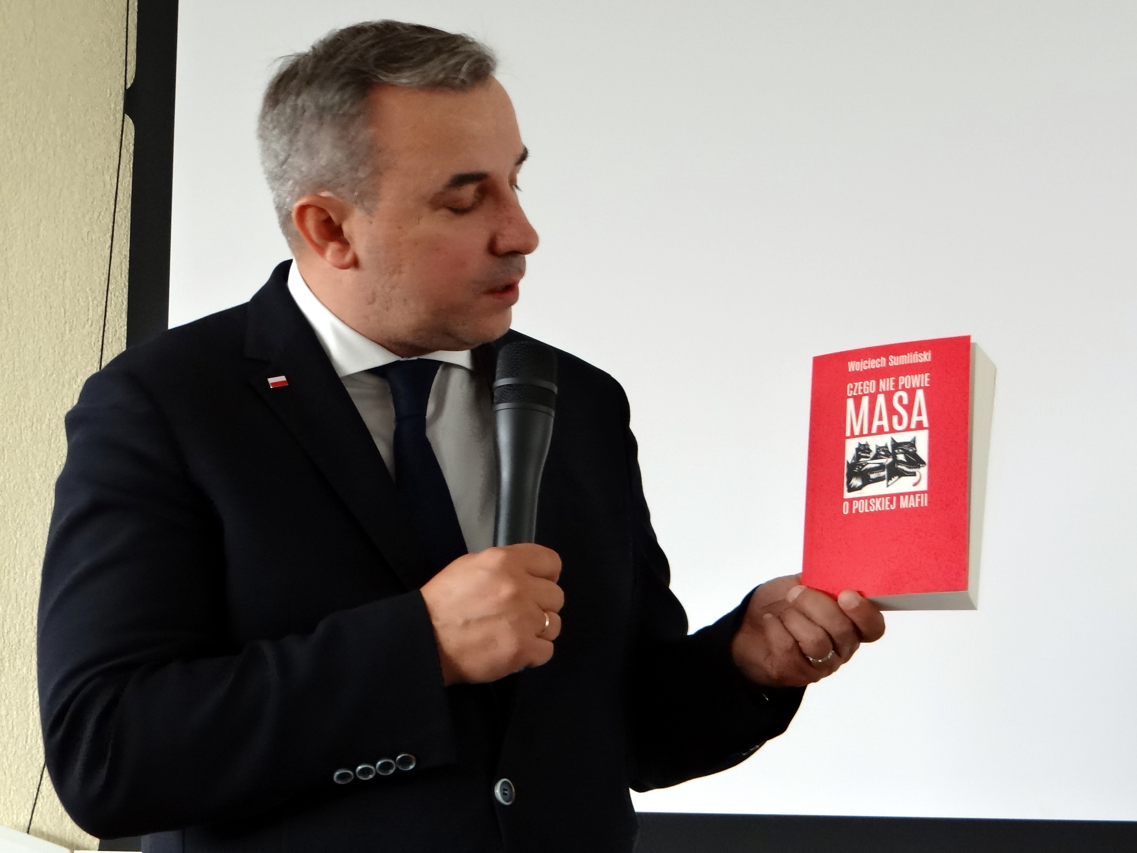 Spotkanie z Wojciechem Sumlińskim w stalowowolskiej Bibliotece Międzyuczelnianej, 6 października 2015 roku. Książka "Czego nie powie Masa o polskiej mafii".